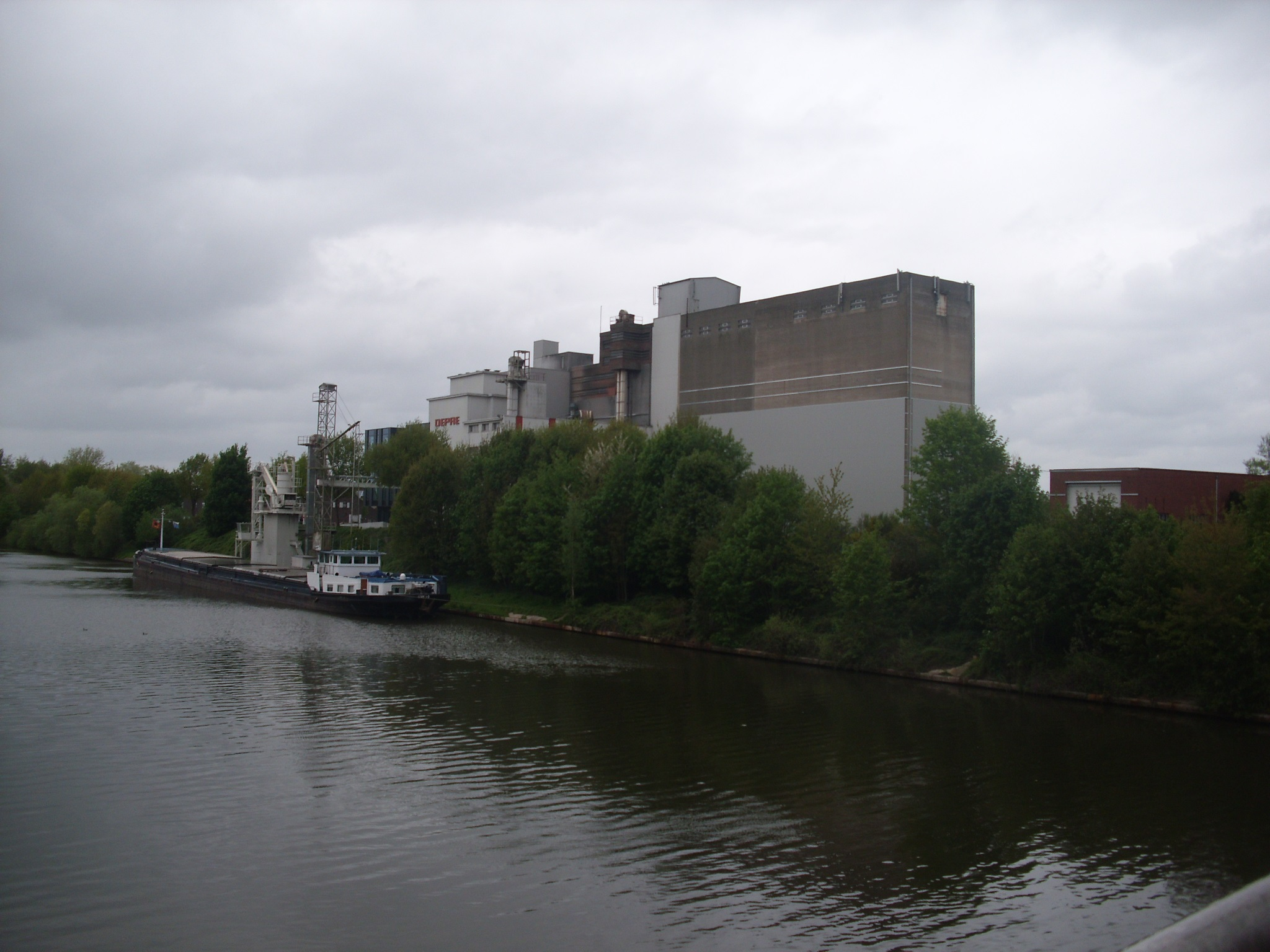 Veevoederbedrijf Depré - Vaart-Noord - langs het Kanaal Gent-Brugge - Beernem - West-Vlaanderen - België